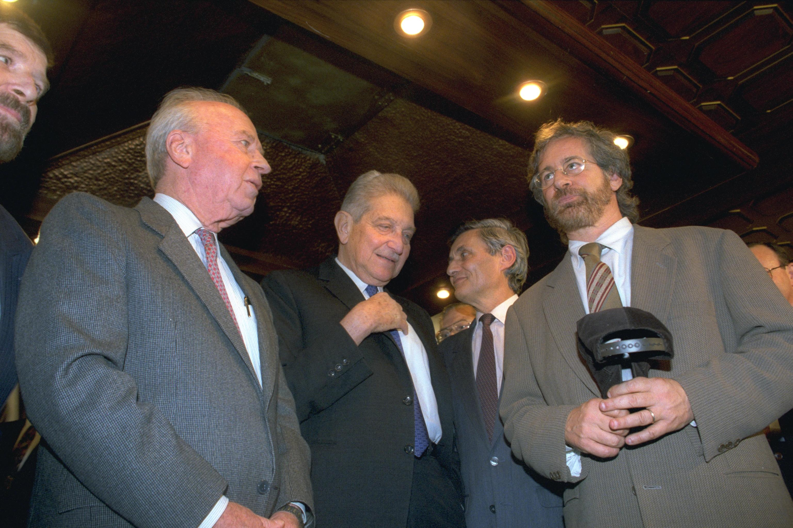 President Ezer Weizman (center) and Prime Minister Yitzhak Rabin (left) with director Steven Spielberg (right) at the Israeli premier of his movie "Schindler's List." נשיא המדינה עזר ויצמן (במרכז), ראש הממשלה יצחק רבין (משמאל) והבמאי סטיבן שפילברג (מימין) בהקרנת הבכורה בישראל של סרטו "רשימת שינדלר". Photo:OHAYON AVI, 03/03/1994.